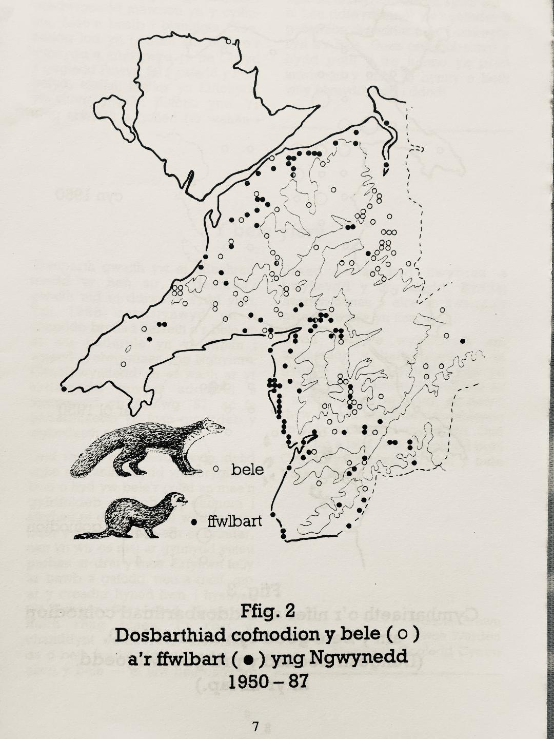 Y BELE GOED map 2: cymhariaeth dosbarthiad y bele a'r ffwlbart yn Nghymru yn Arolwg 1987.